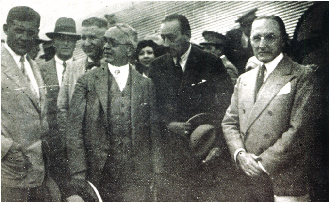 LLega Mision Kemmerer